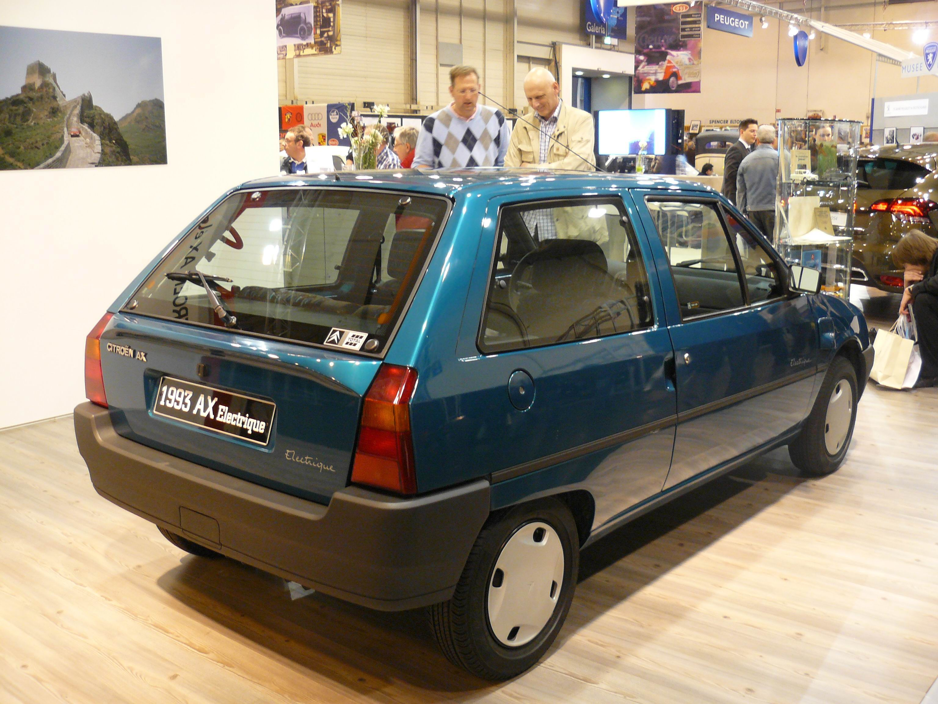 Essen 2011